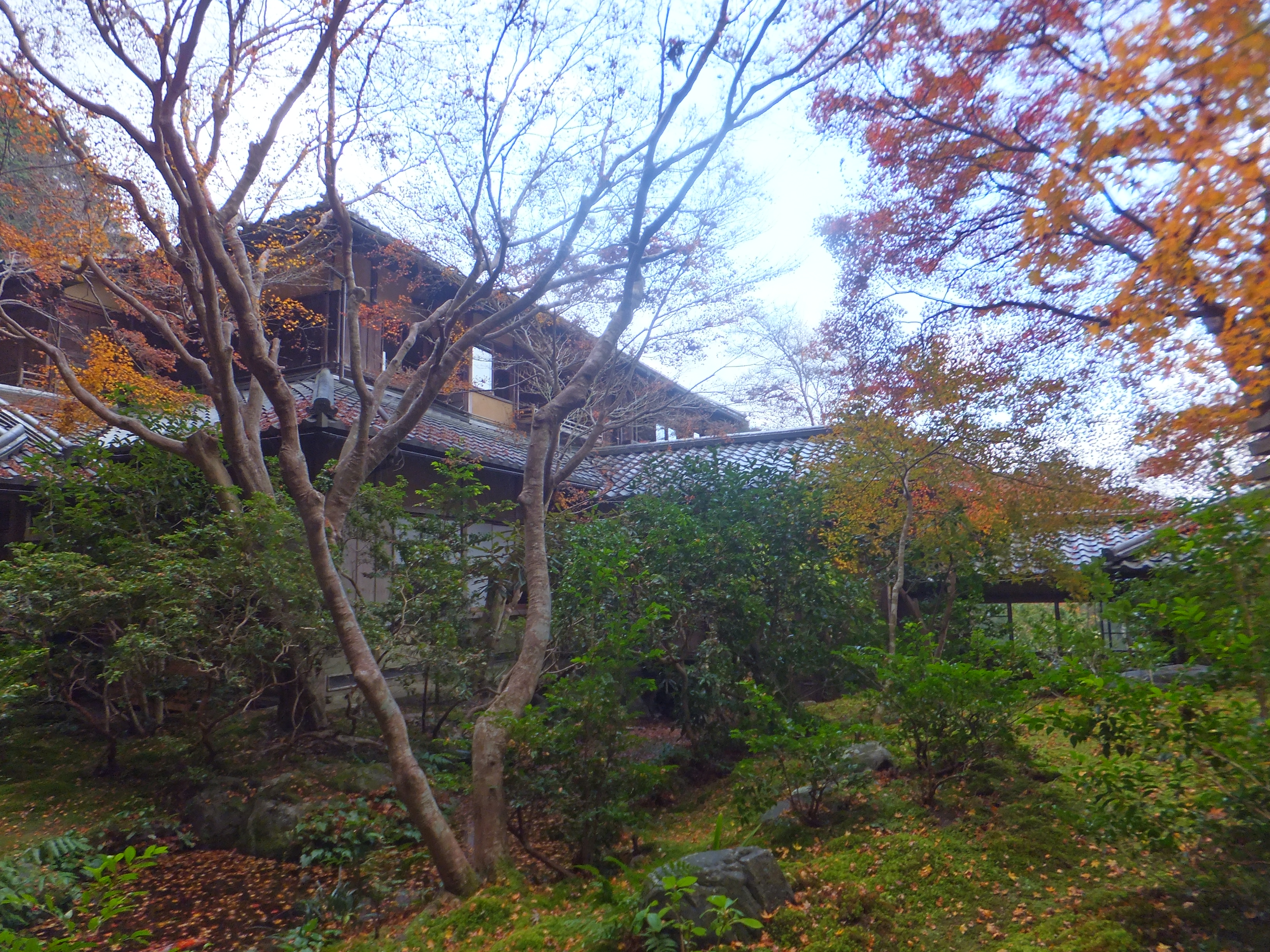 光明寺瑠璃光院